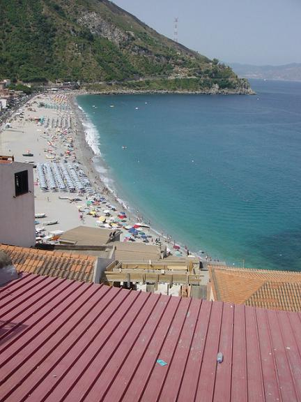 Spiaggia di Scilla, Reggio Calabria, Italy